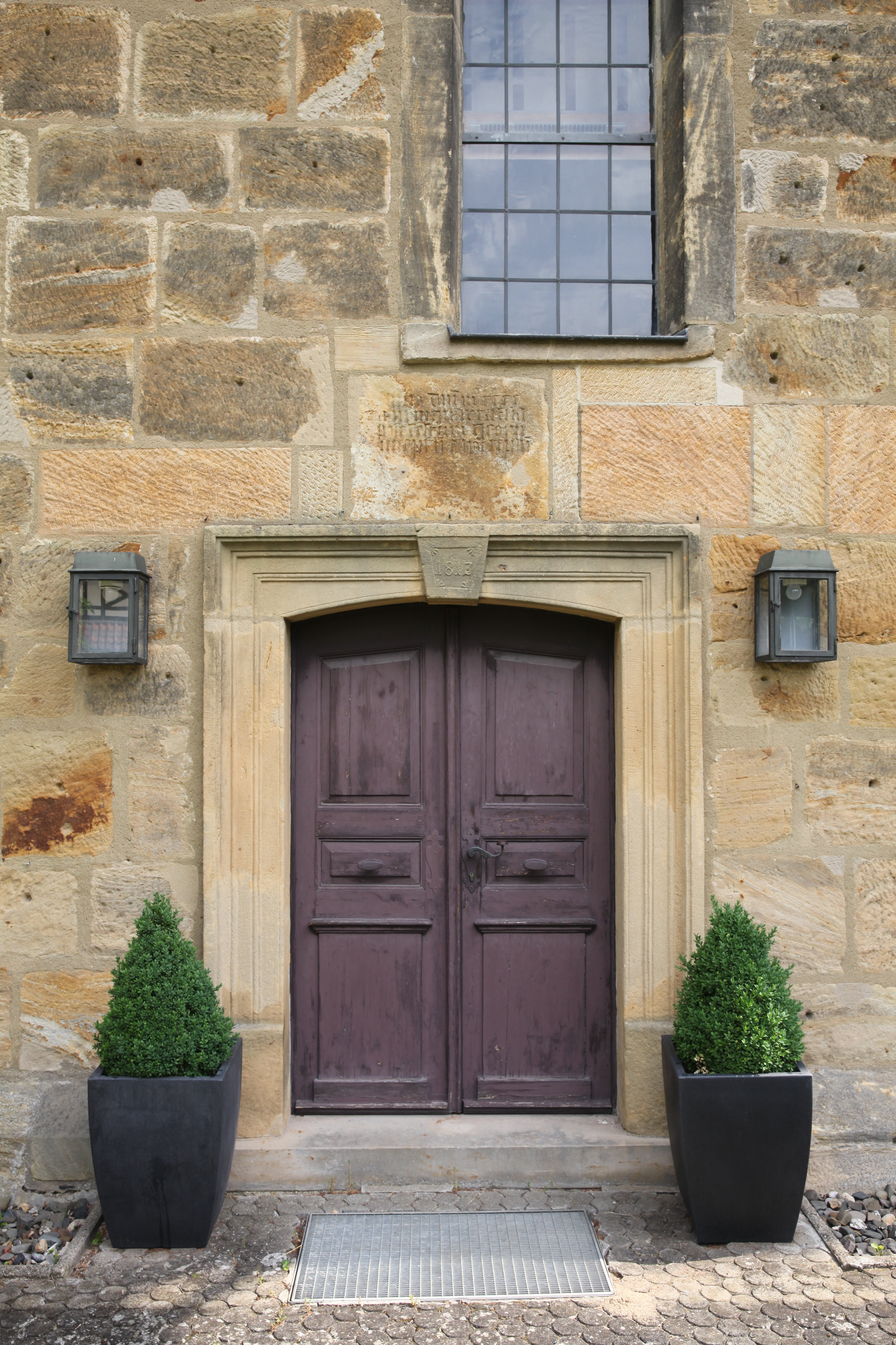 Evangelische Pfarrkirche in Großheirath